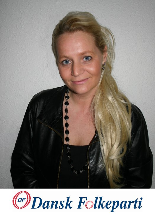 Karina Adsbøl, folketingskandidat for Dansk Folkeparti i Kolding Kommune.